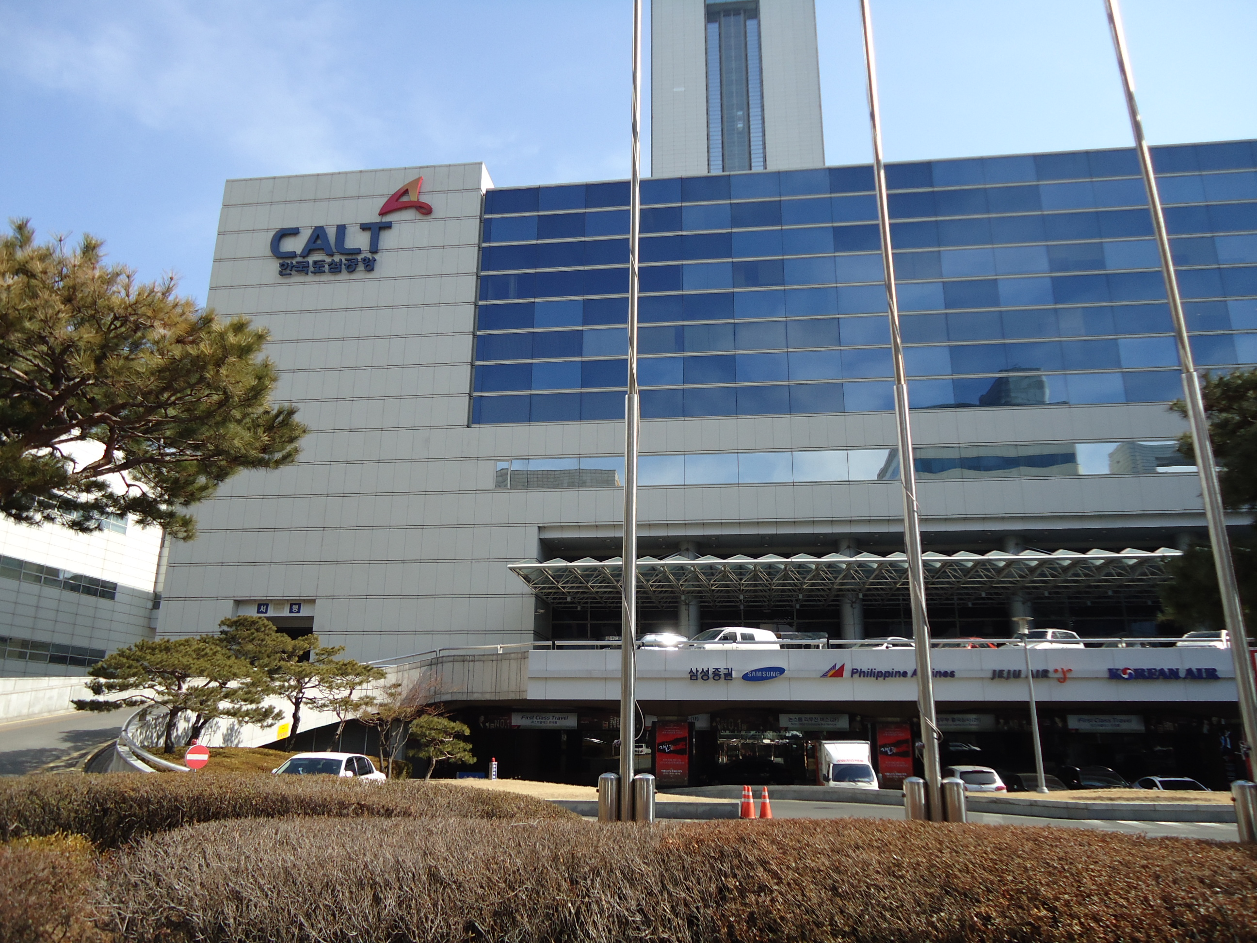 한국도심공항터미널 전경